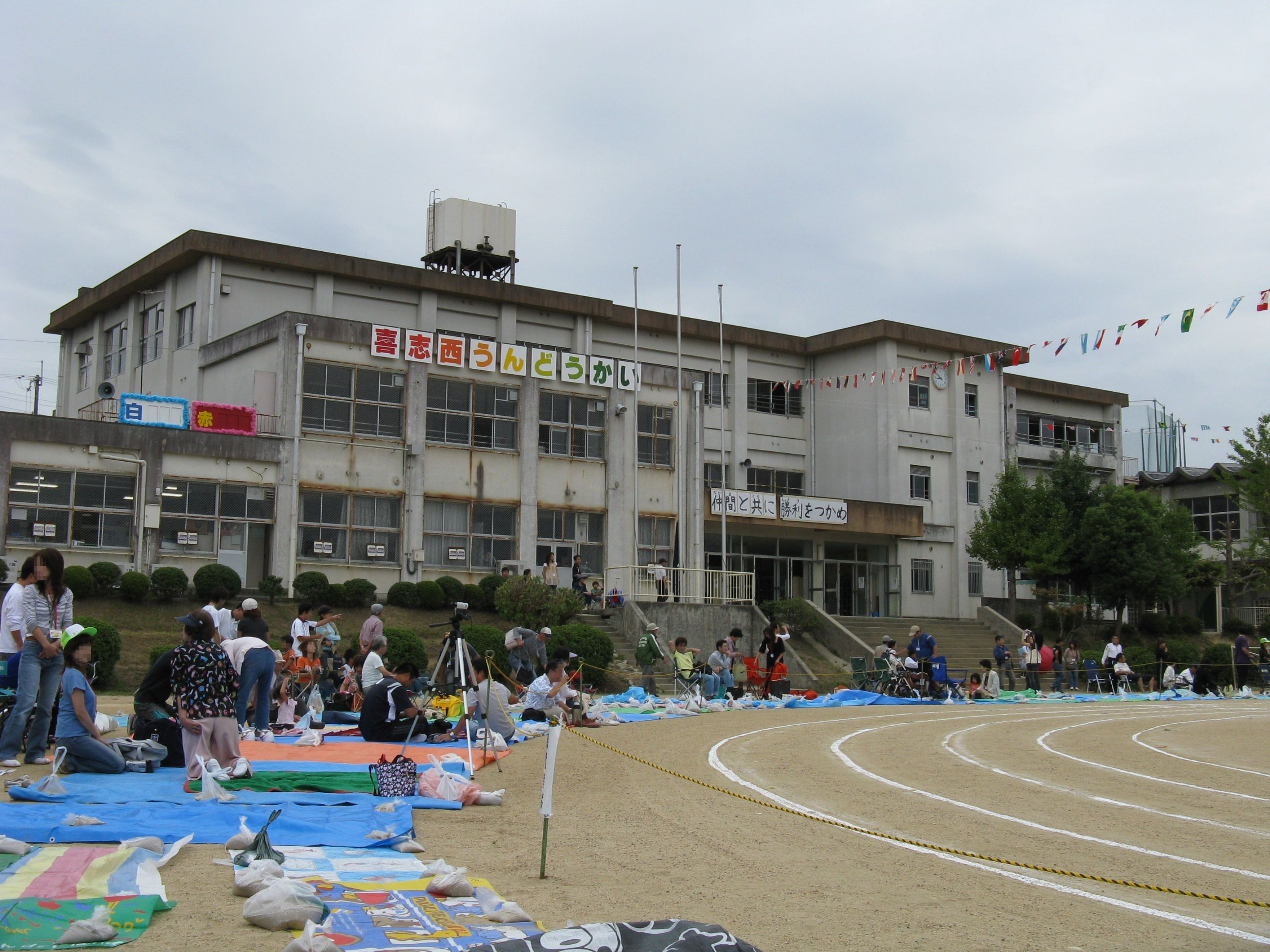 富田林市立喜志西小学校